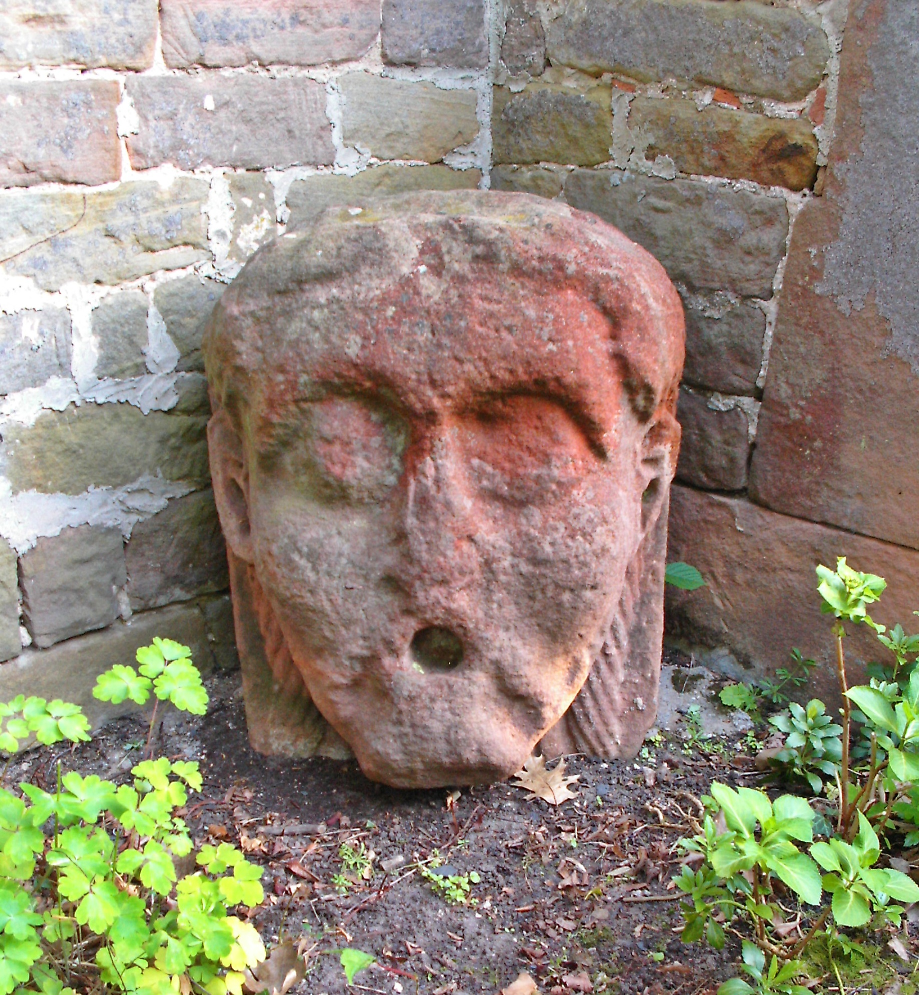 Kloster Höningen, Pfalz, romanischer Kopf, heutiger Friedhof (vermutlich Wasserspeier des Klosterbrunnens)